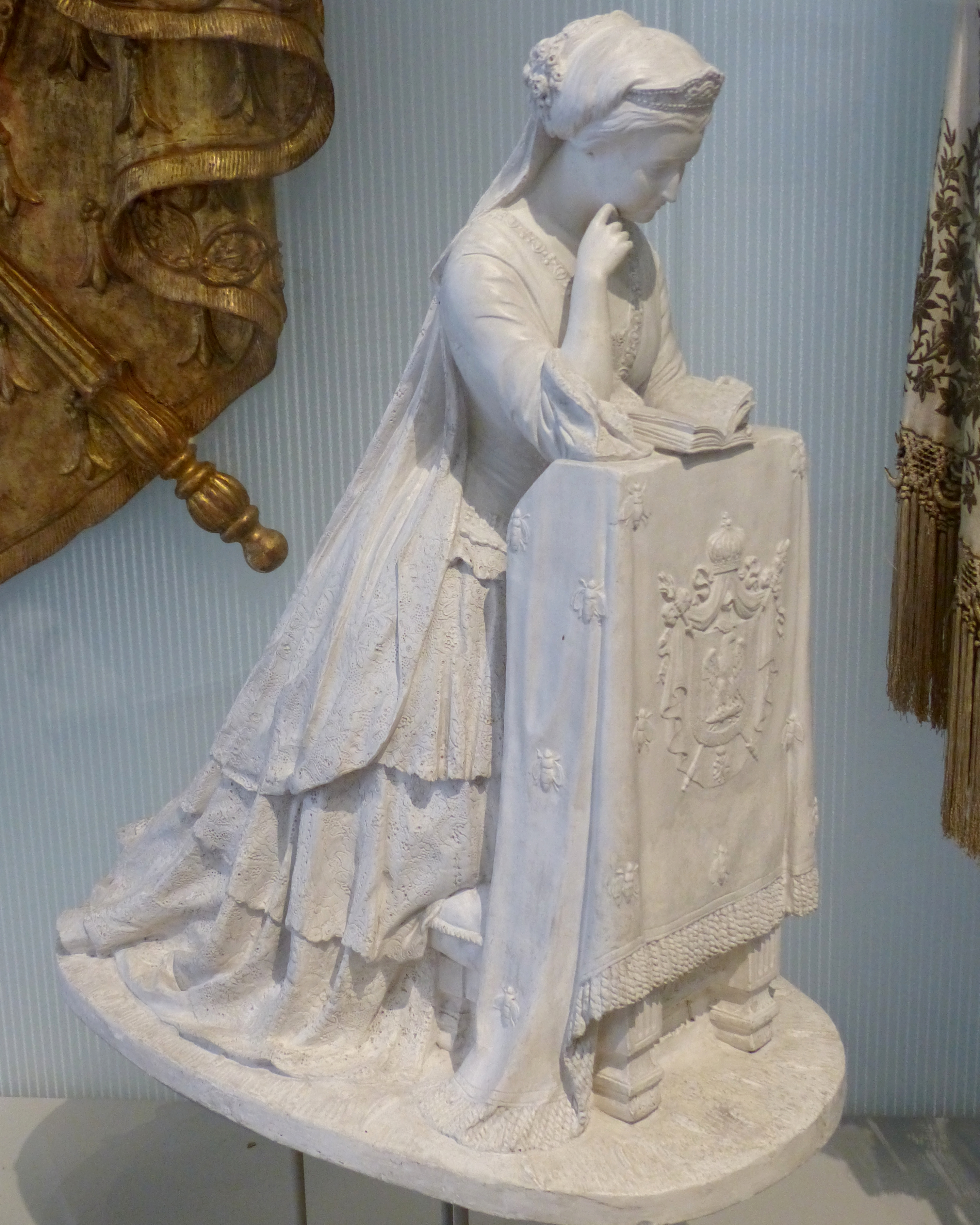 Nice (Alpes-Maritimes, France), sur la promenade des Anglais, la Villa (palais plutôt) Masséna, siège du musée du même nom. L'Impératrice Eugénie en prière. Souvenir de Notre-Dame, plâtre, par Marie-Louise Lefèvre-Deumier en 1853.